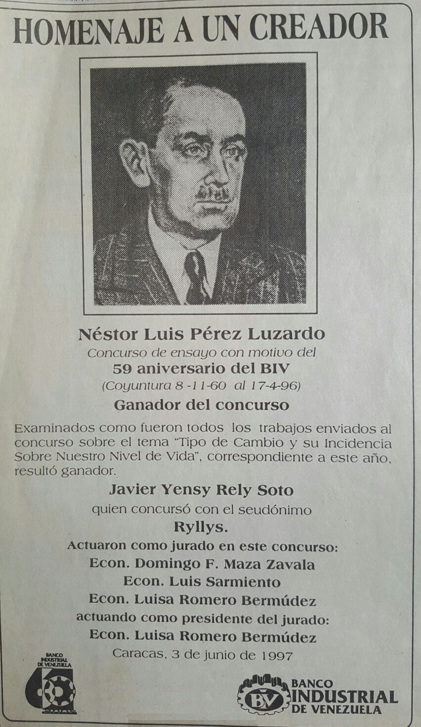 Fotografía del aviso con el nombre del ganador del "Concurso Néstor Luis Pérez Luzardo", organizado por el Banco Industrial de Venezuela en ocasión de su 59 aniversario. El aviso fue publicado por el diario “El Universal”, el 13 de junio de 1997.